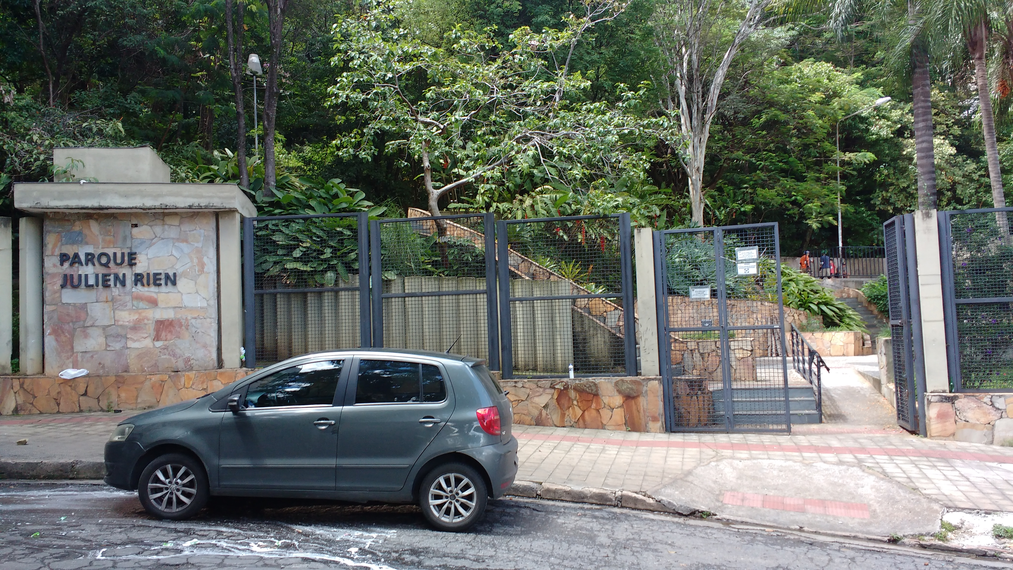 Entrada do parque Julien Rien, em Belo Horizonte.